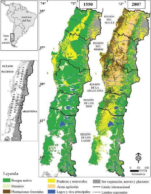 Ubicación del área de estudio, cobertura de la vegetación y de uso del suelo en la ecorregión valdiviana (35°S - 43°30' S) hacia 1550 y en 2007. Las categorías áreas urbanas y humedales no son mostradas.